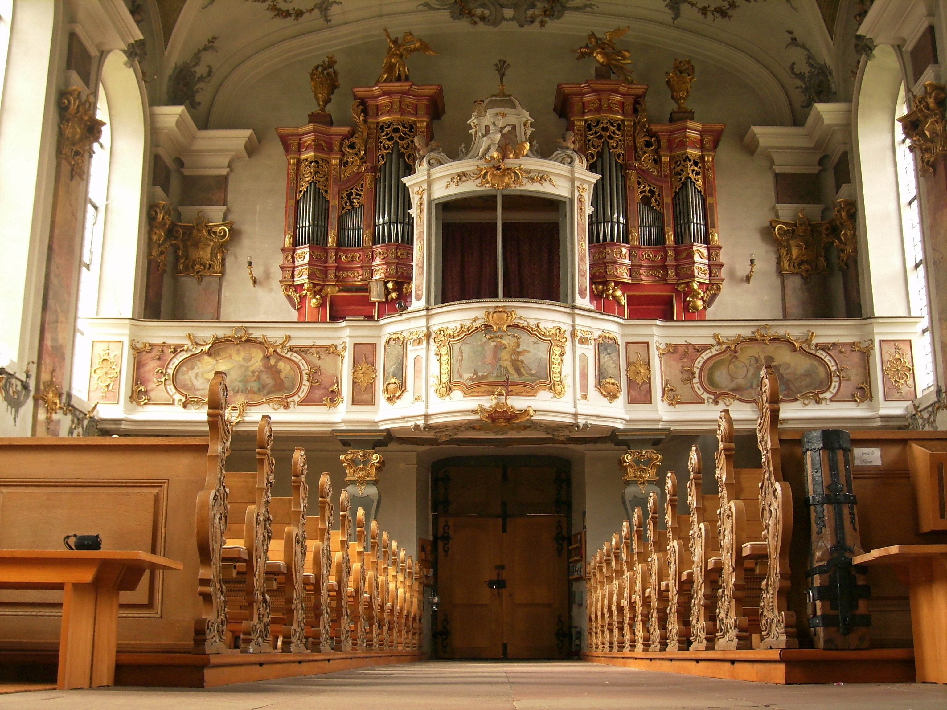 Haigerloch Wallfahrtskirche Sankt Anna